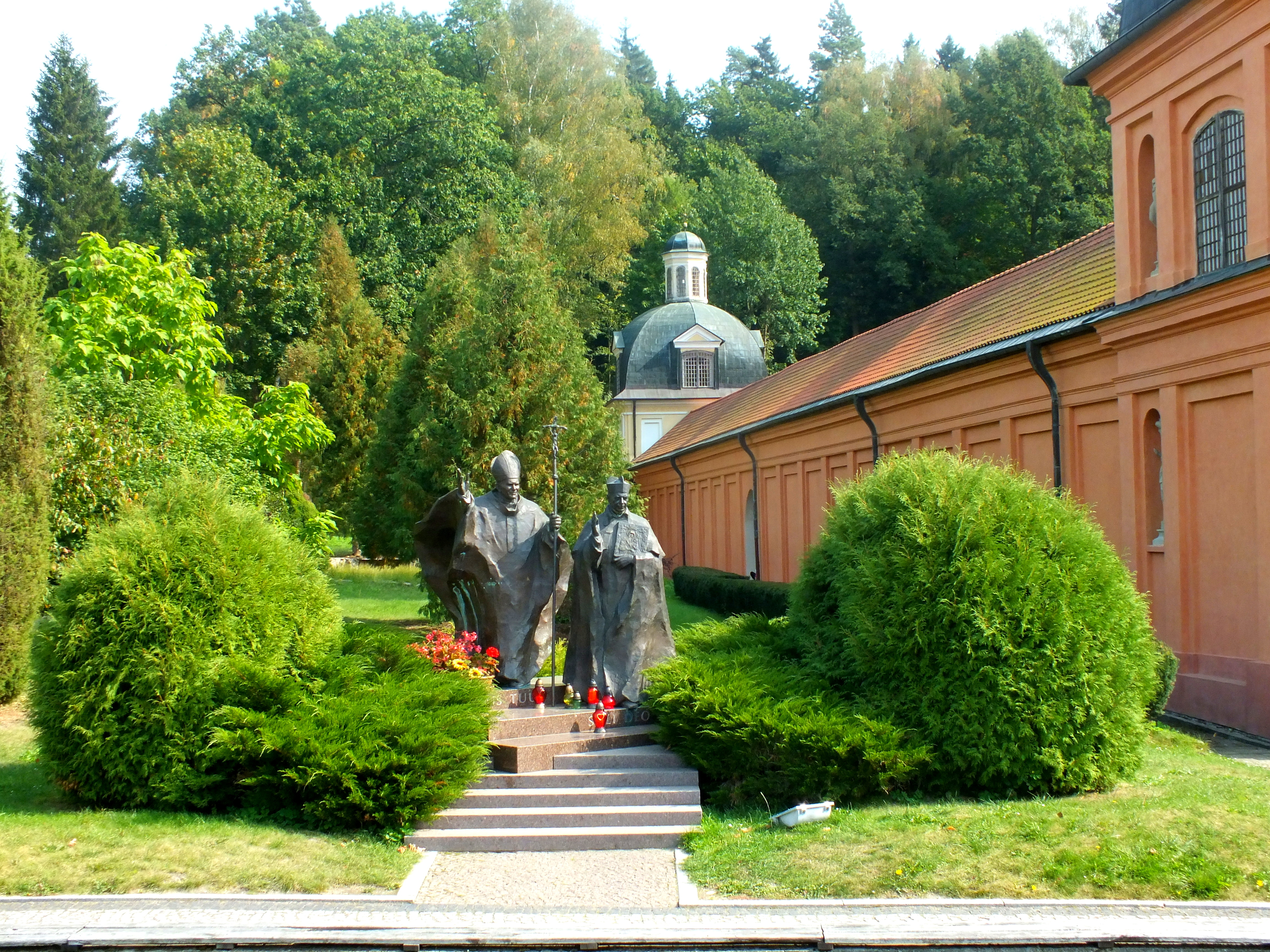 Święta Lipka, pomnik Jana Pawła II i kardynała Stefana Wyszyńskiego. Autorami rzeźby są Krystyna Fałdyga-Solska i Bogusław Solski Wikidata has entry Q31804345 with data related to this item.